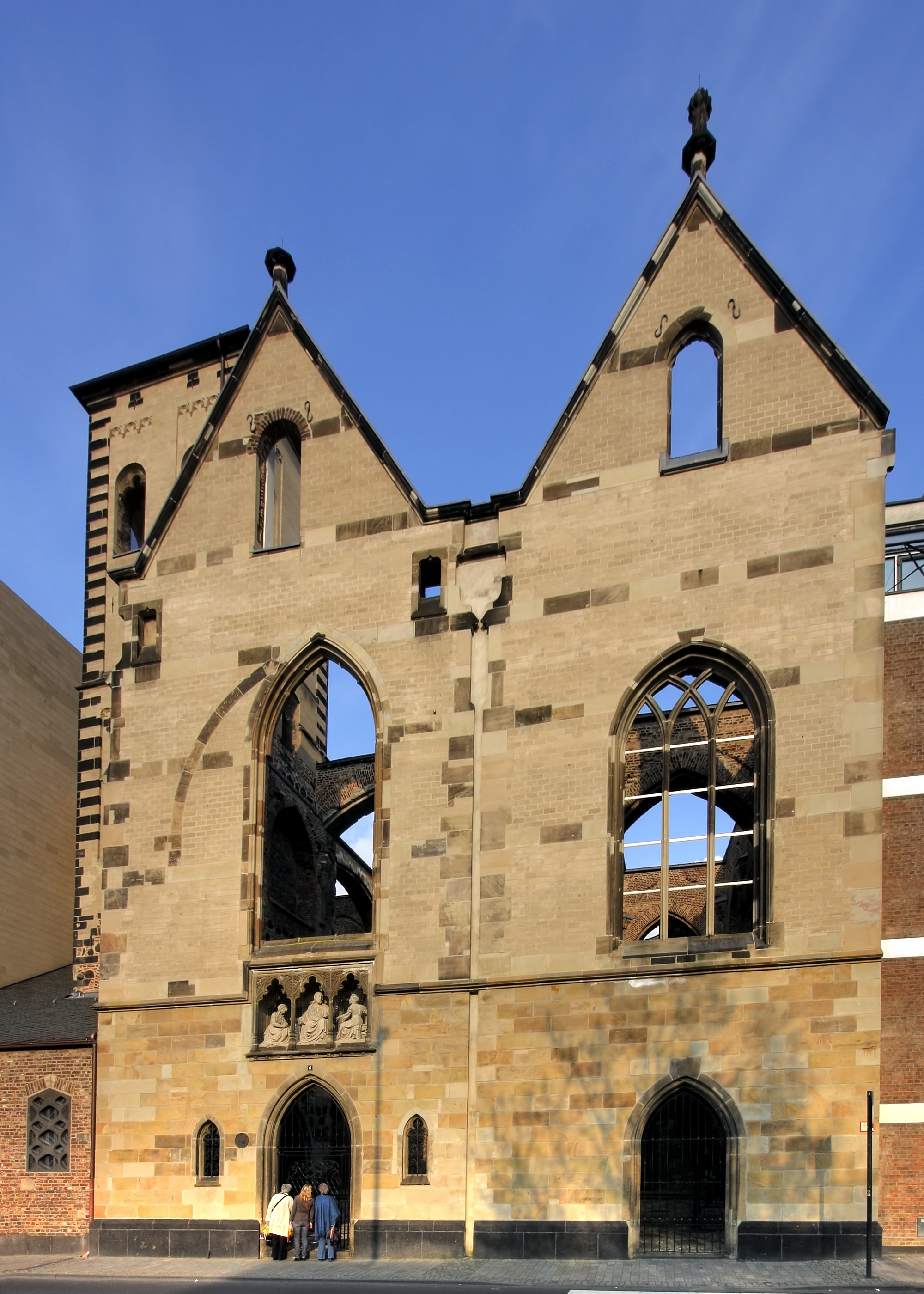 Alt St. Alban, Köln.